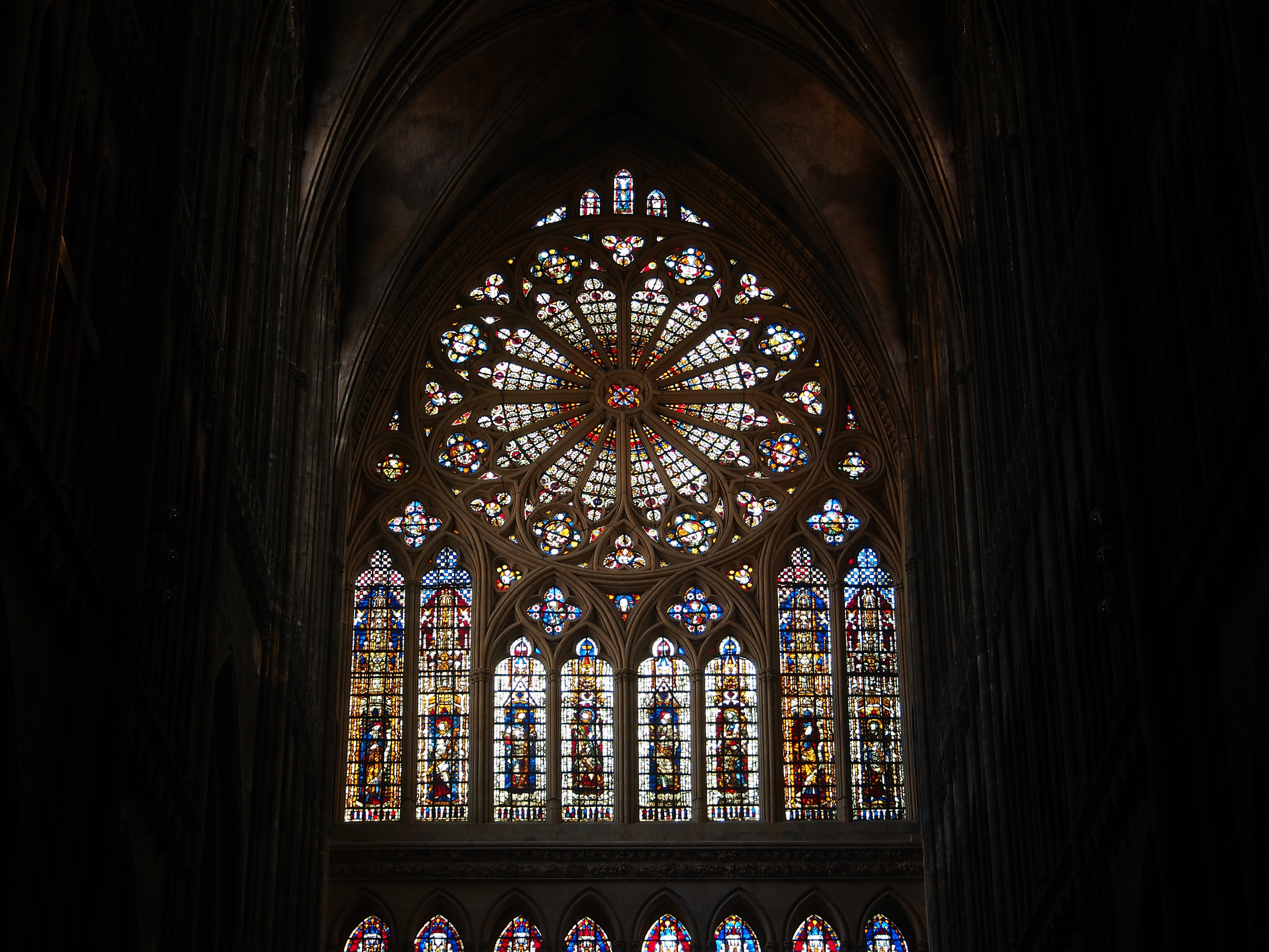 Photographed in the Cathédrale Saint-Étienne de Metz, France.